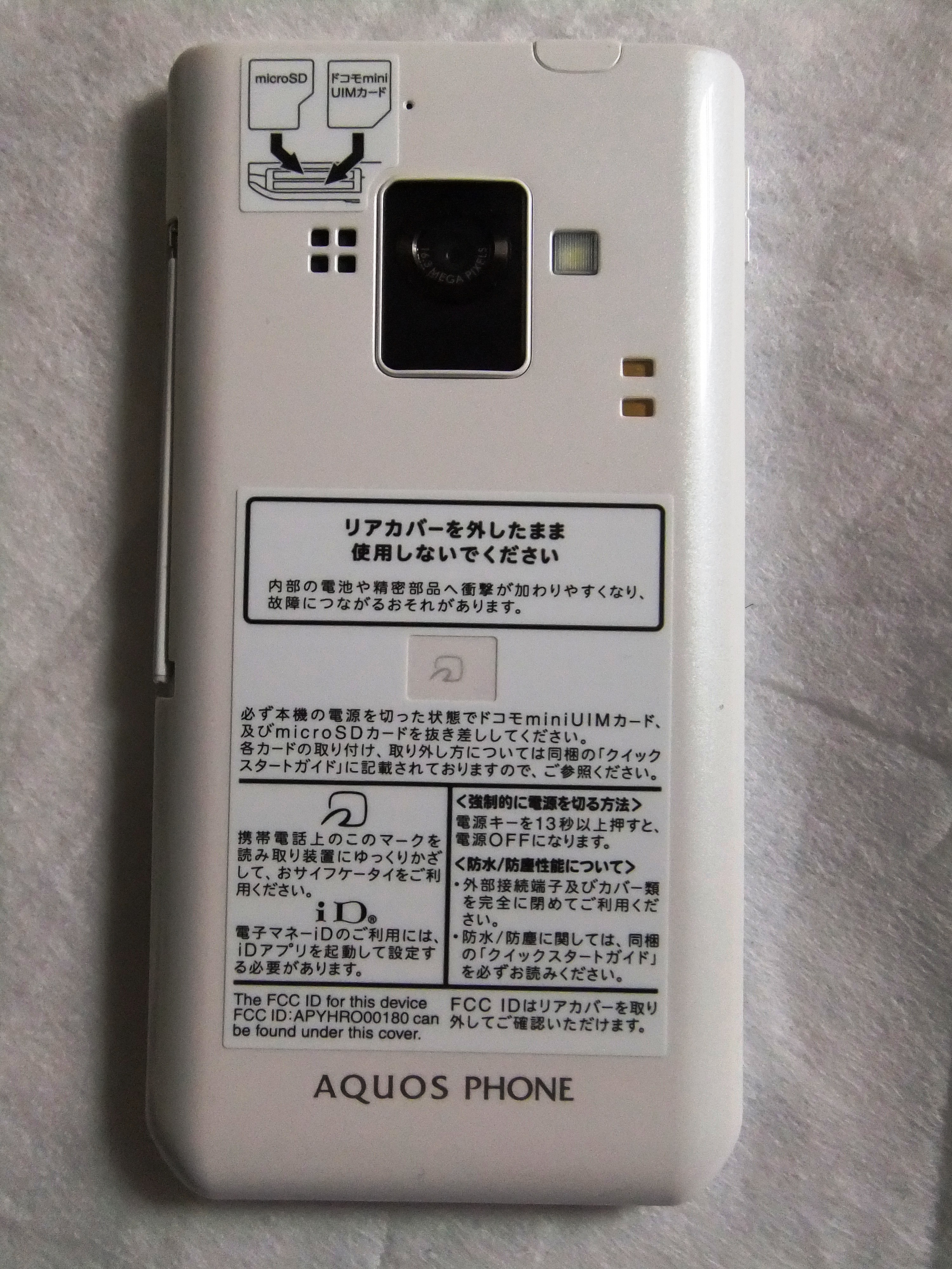 SH-02Eの裏側には1630万画素のCMOSカメラとフォトライト、赤外線ポート、FeliCa/NFCポートがある。リアカバーは取り外せるが、電池パックは取り外す事は不可。